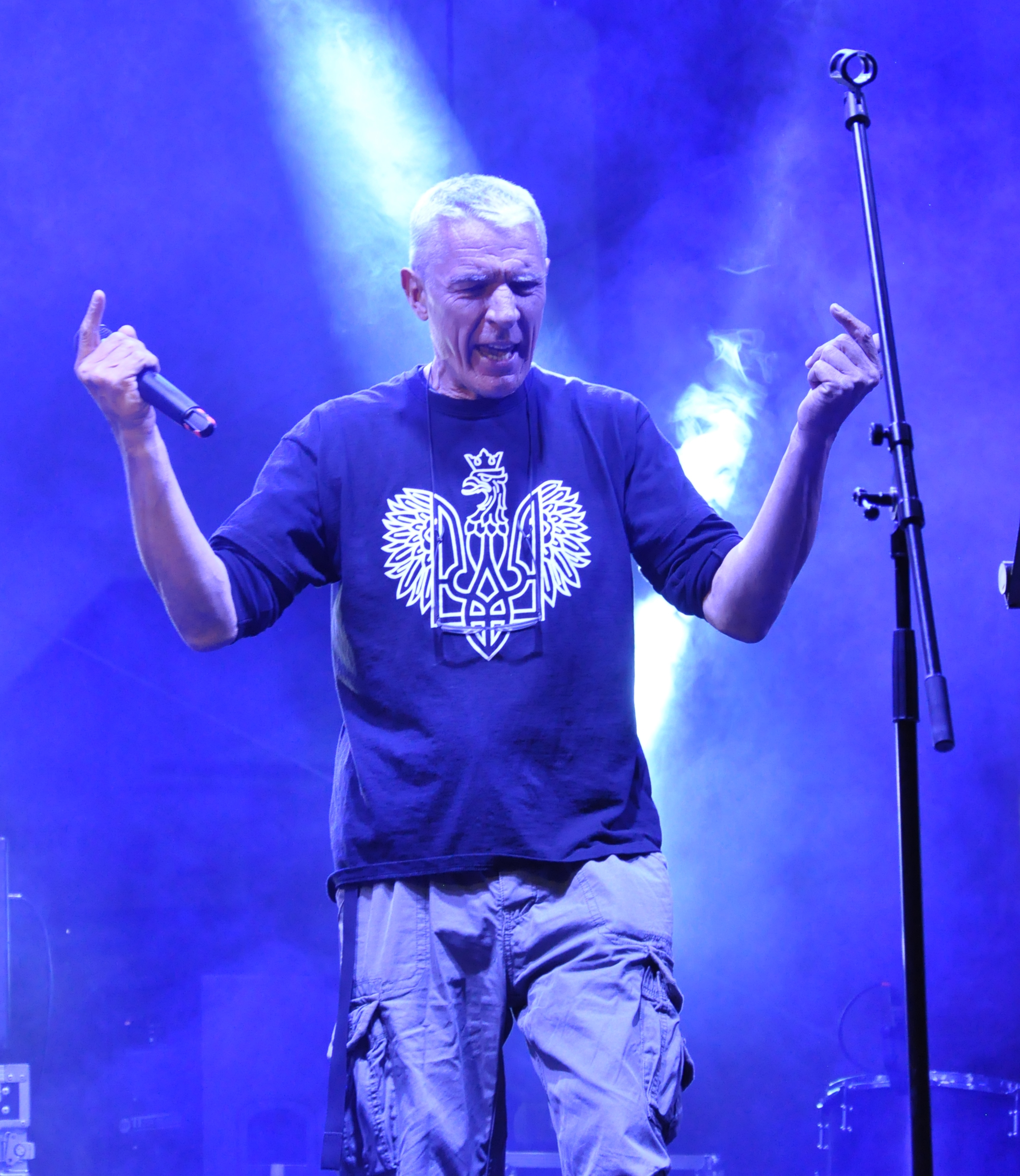 Andrzej Stasiuk (ur. 1960) - polski prozaik, poeta, dramaturg, eseista, publicysta i wydawca. Zdjęcie wykonane 01.05.2019. w czasie "Koncertu Wolności" w Cieszynie (wystąpił z ukraińską formacją etno-rockową Haydamaky w projekcie "Mickiewicz").